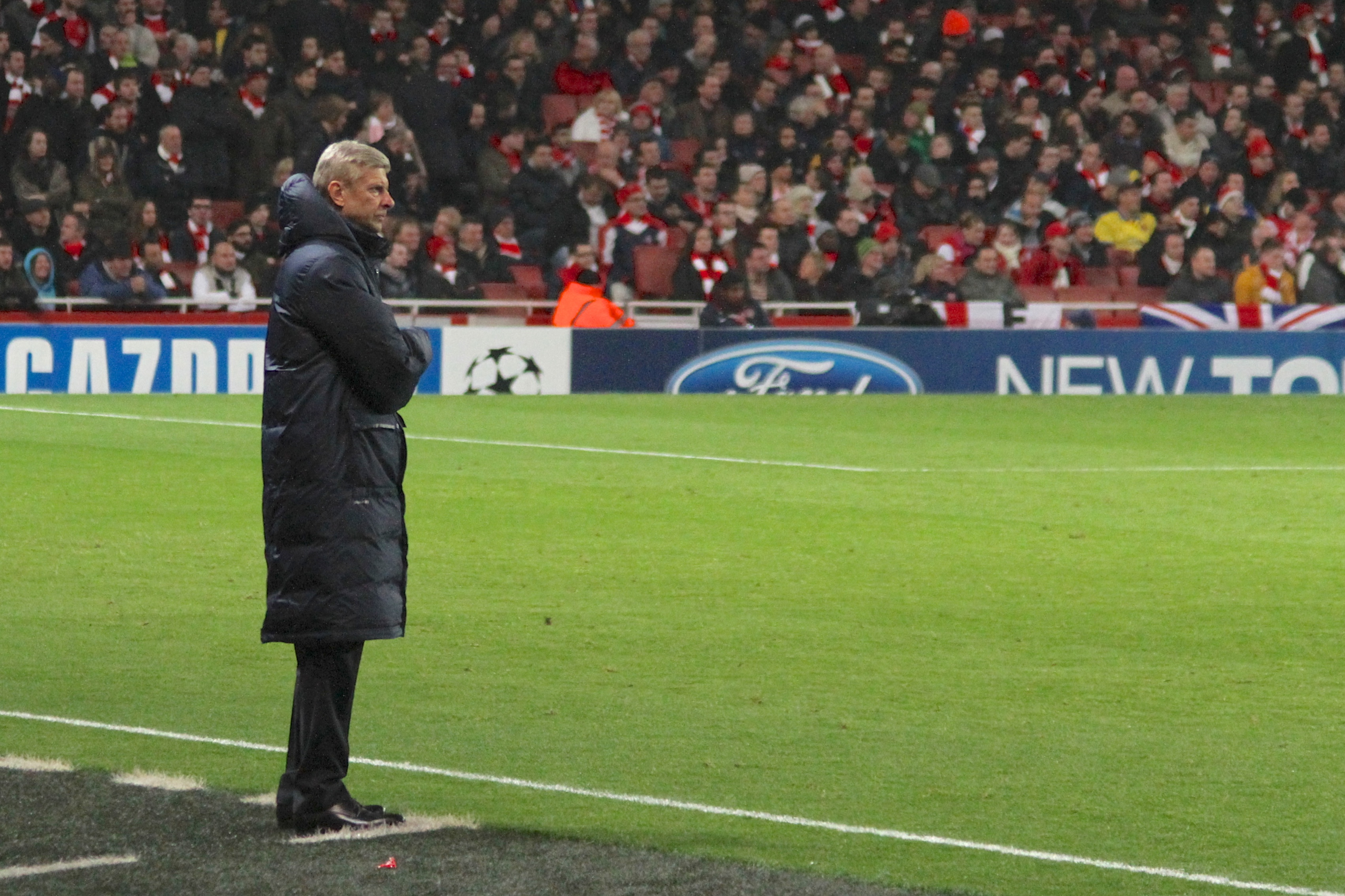 Arsène Wenger looks on